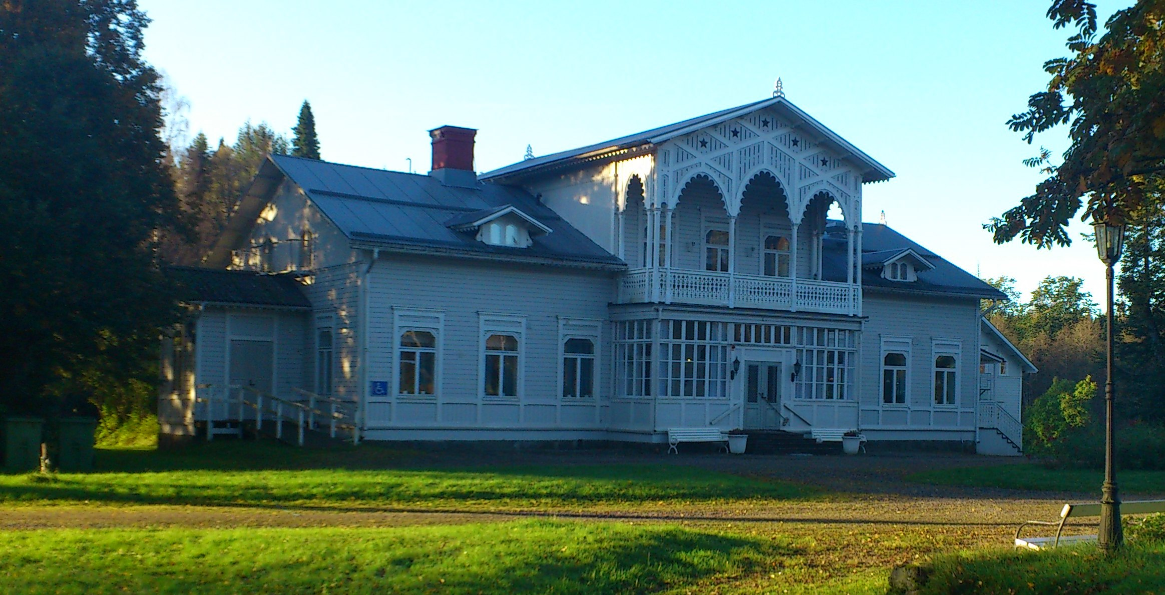 Herrgården på Lögdö bruk